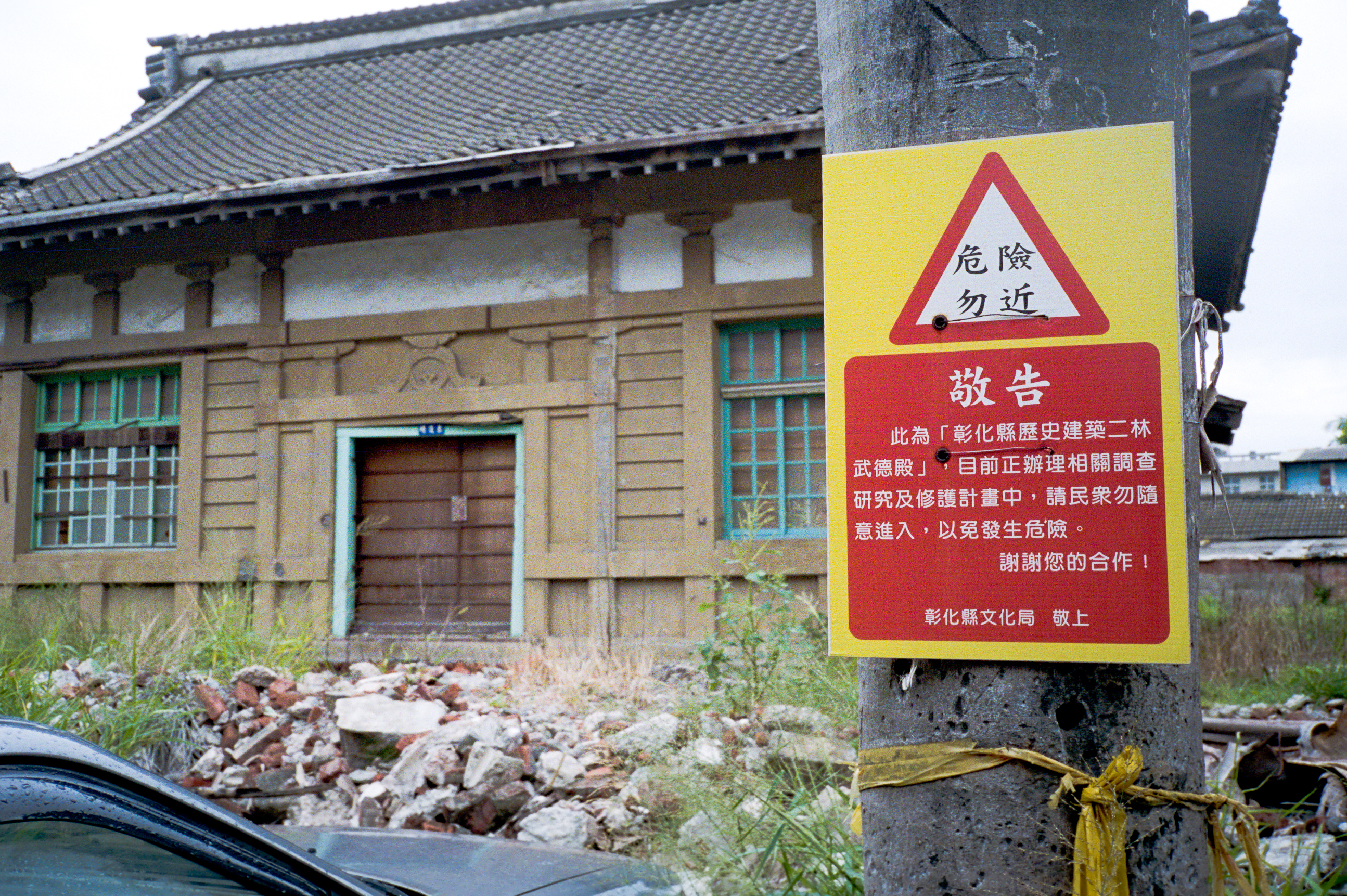 中文（台灣）: 二林武德殿，彰化縣文化局公告請民眾勿隨意進入。